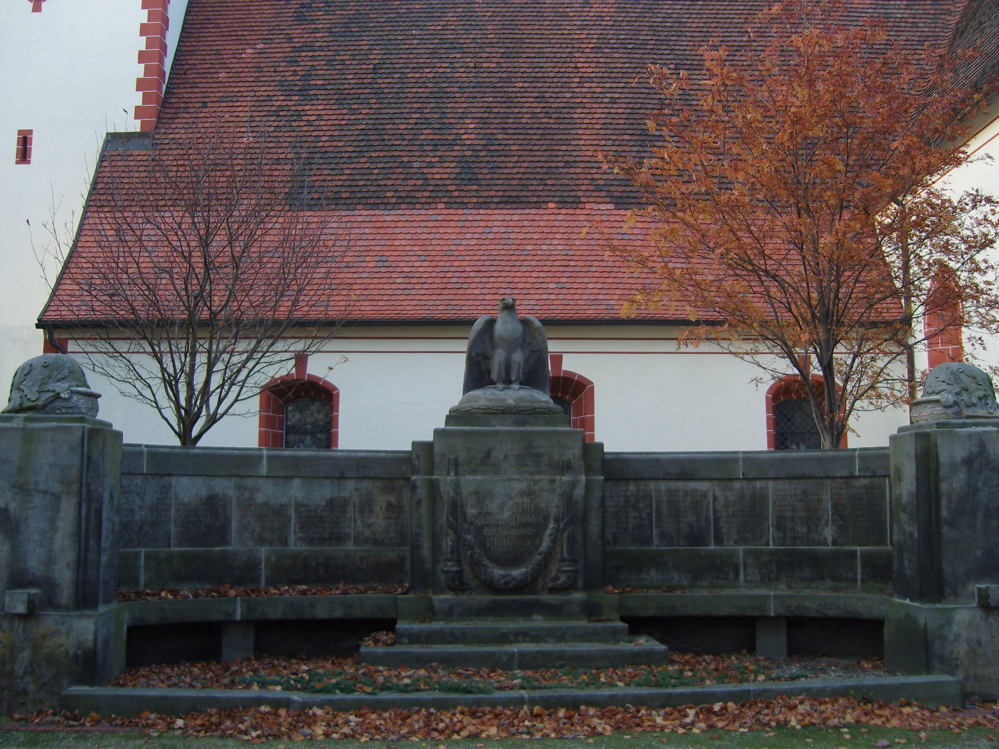 Kriegerdenkmal für die Gefallenen des Ersten Weltkrieges in Klettwitz